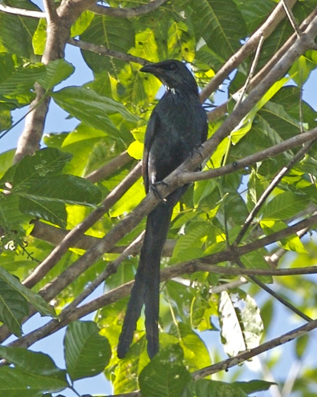 Long-tailed Starling Aplonis magna, Biak, Papua, Indonesia. 15 January 2008. _Q0S6506 |]Long-tailed Starling (Aplonis magna)